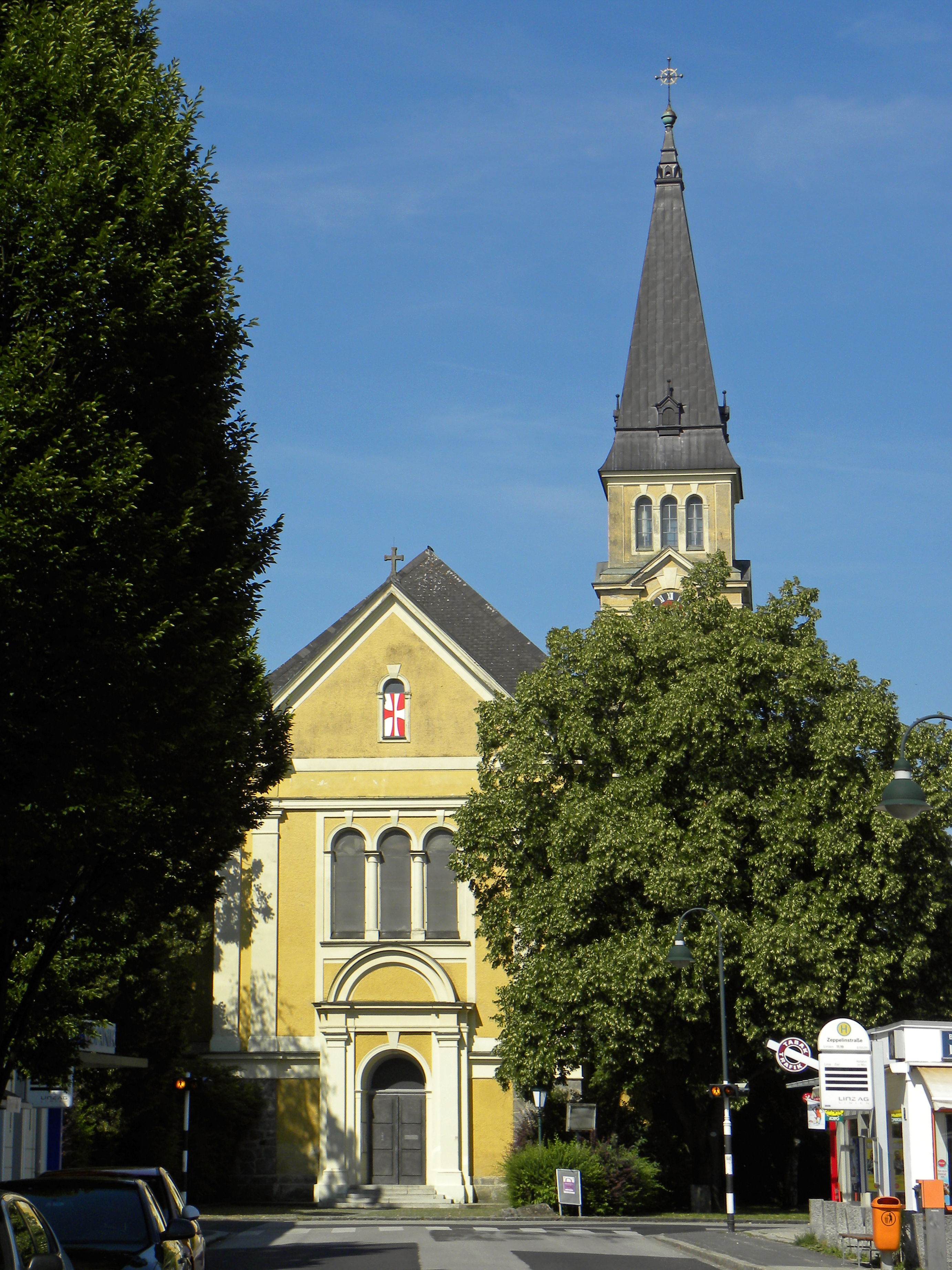 Kath. Pfarrkirche hl. Josef und hl. Quirinus in Linz-Kleinmünchen